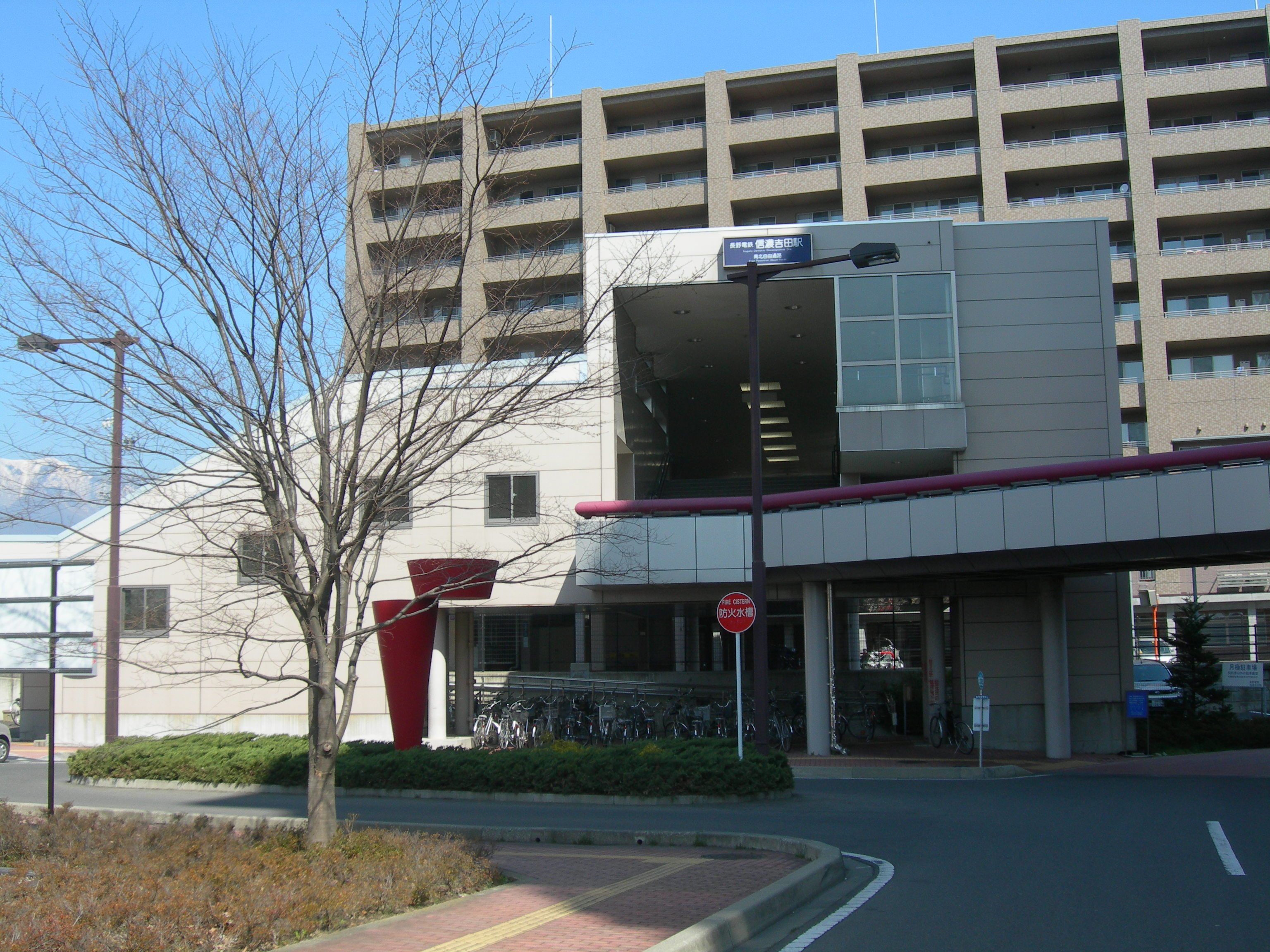 信濃吉田駅